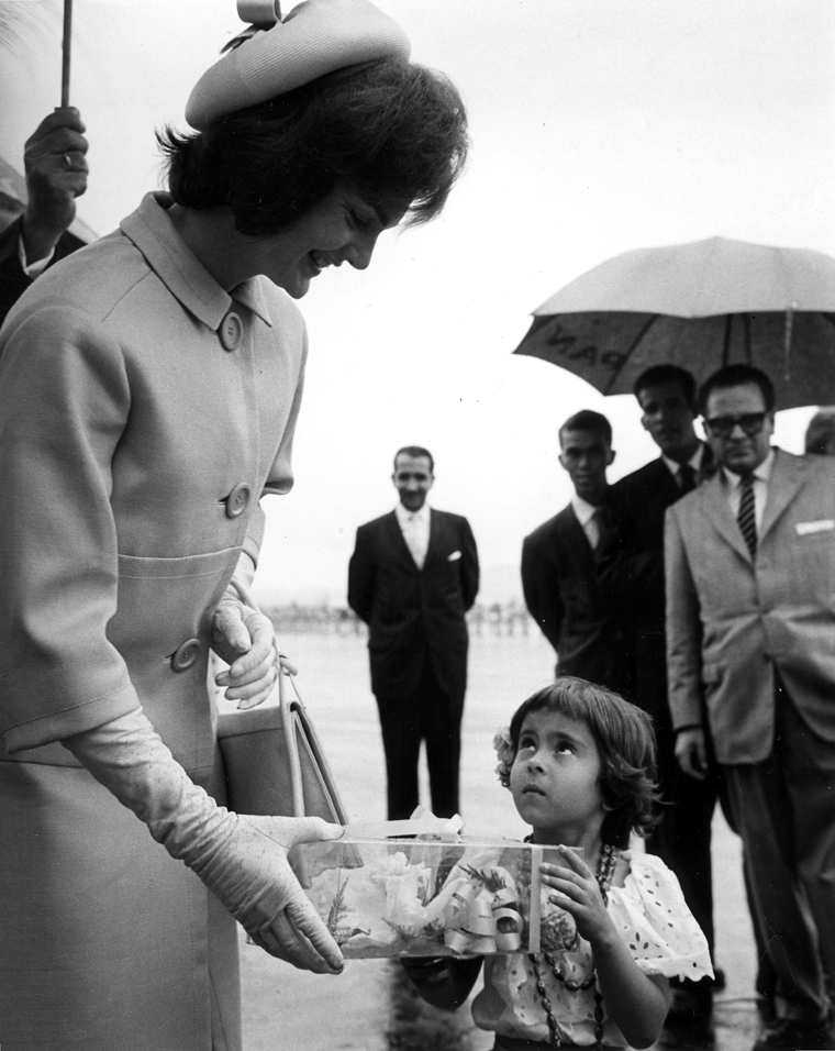 Arrival ceremony at Maiquetia Airport, Caracas, Venezuela. First Lady Jacqueline Kennedy accepts corsage from young Venezuelan.